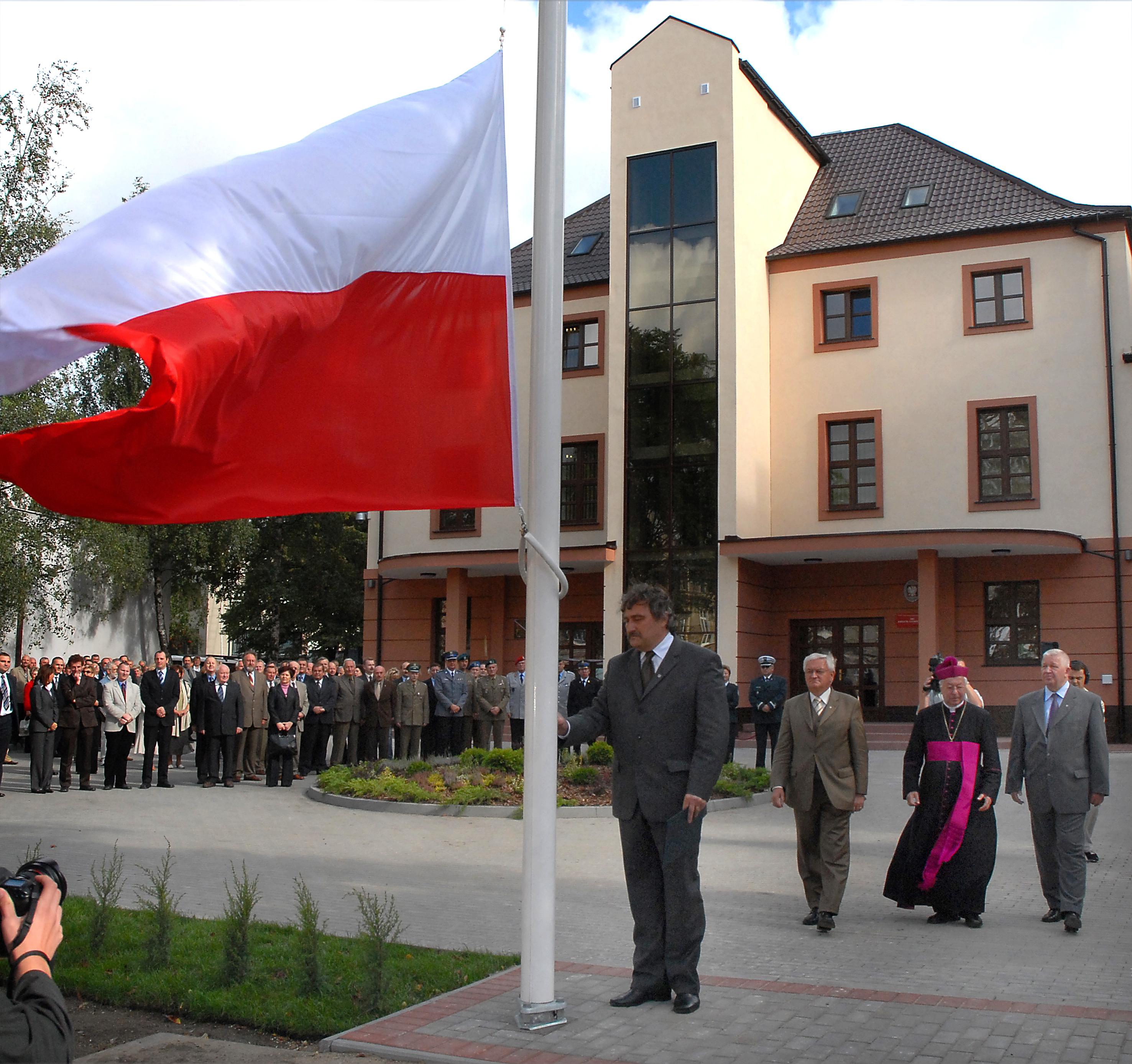 W dniu 4 września 2006 roku została otwarta nowa siedziba Sejmiku, przy ul. Mickiewicza 41 w Szczecinie, w której Radni Województwa obradują w comiesięcznych sesjach.